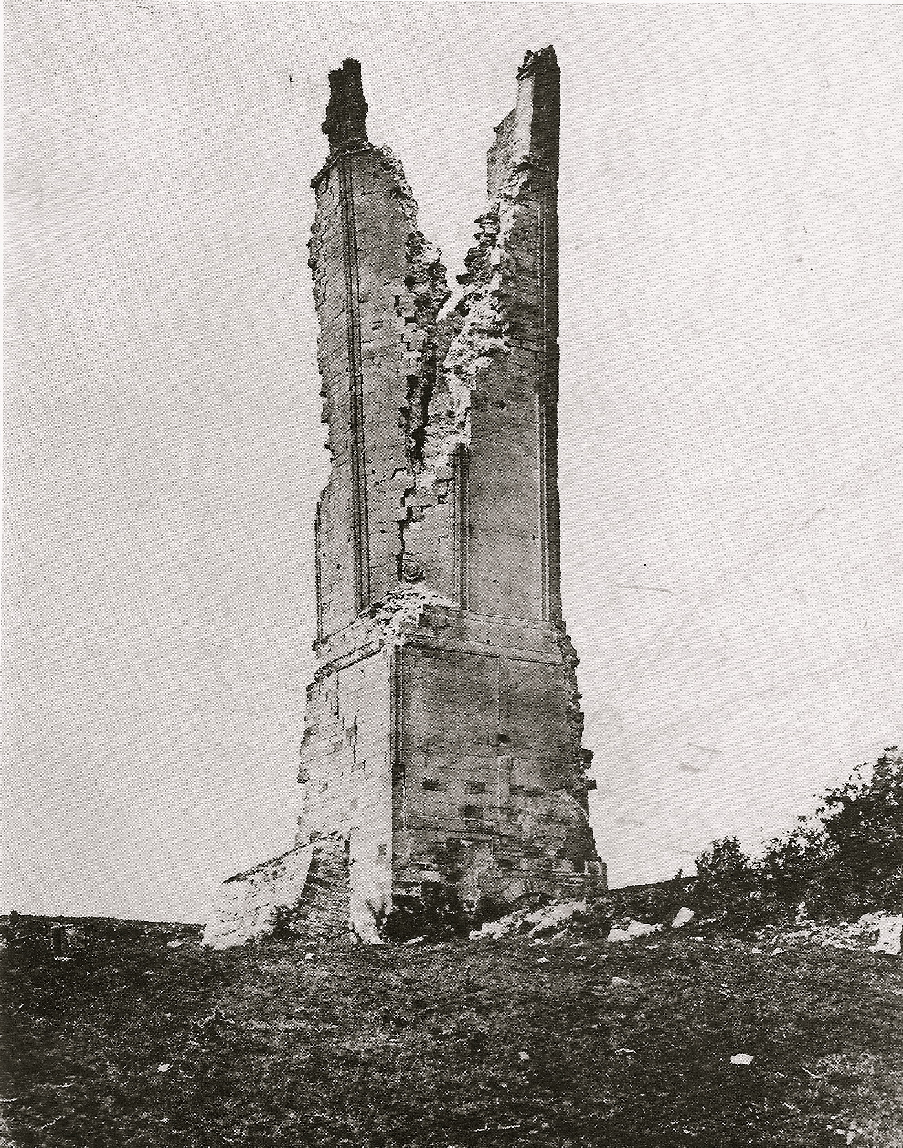 Turmruine des Kloster Hasungens bei Kassel kurz nach dem Blitzeinschlag vom 1. VII. 1876